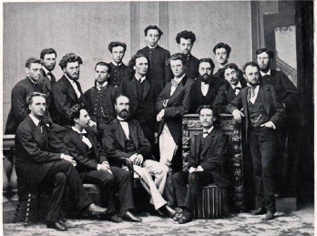 Gustave Lefèvre, Directeur, au centre, entouré des élèves et professeurs de l'Ecole Niedermeyer, parmi lesquels Gabriel Fauré, André Messager et Eugène Gigout